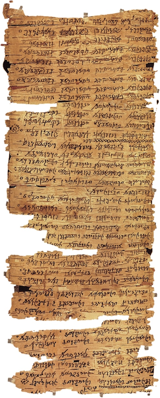 Manuscrit du Dhammapada (Vers sur la Loi) ; Inde, texte antérieur au IIe siècle de notre ère ; Feuillets en écorce de bouleau ; BnF, Manuscrits, pali 715-A